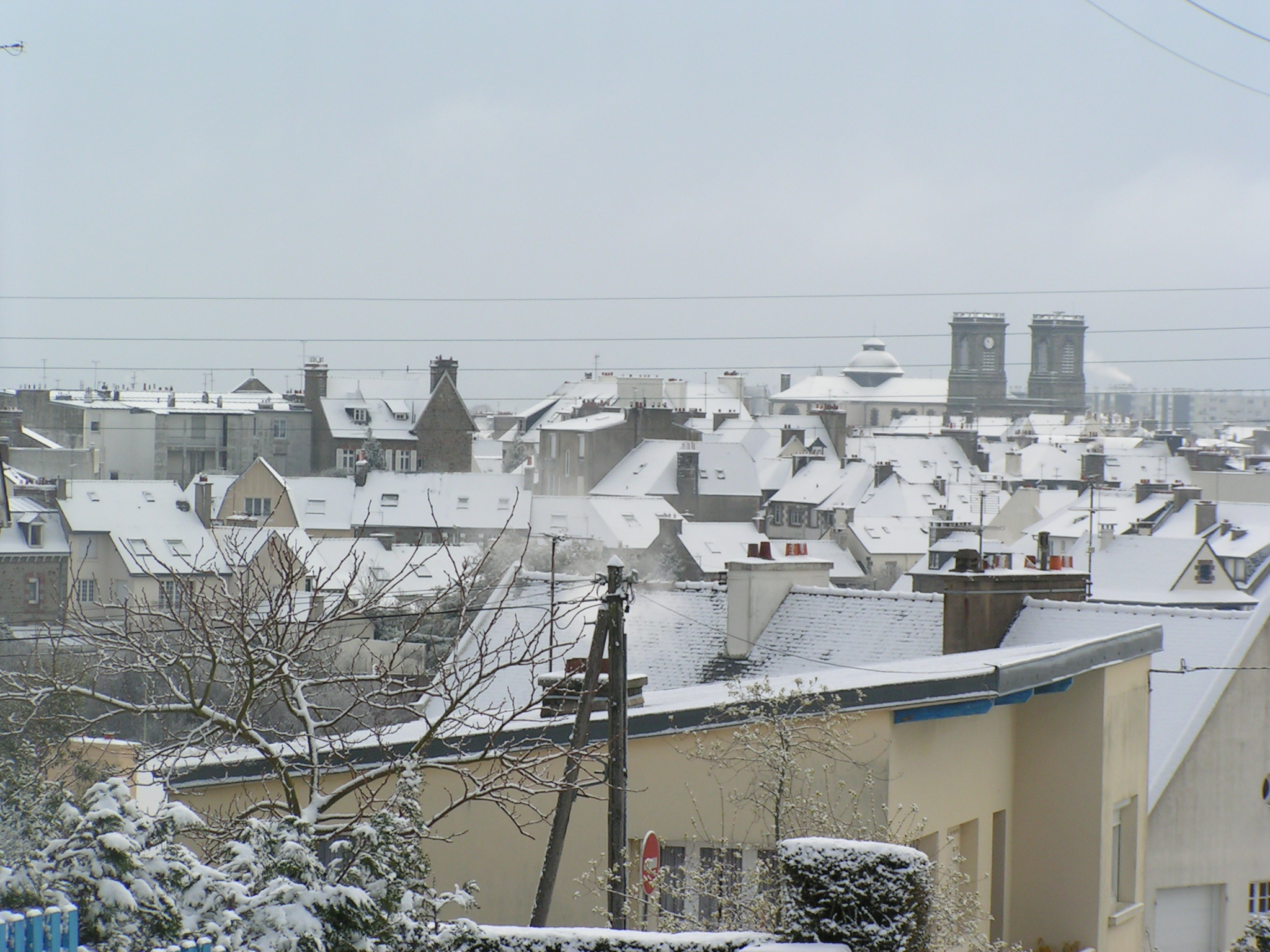 Saint-Brieuc sous la neige. Au fond l'église Saint-Michel.